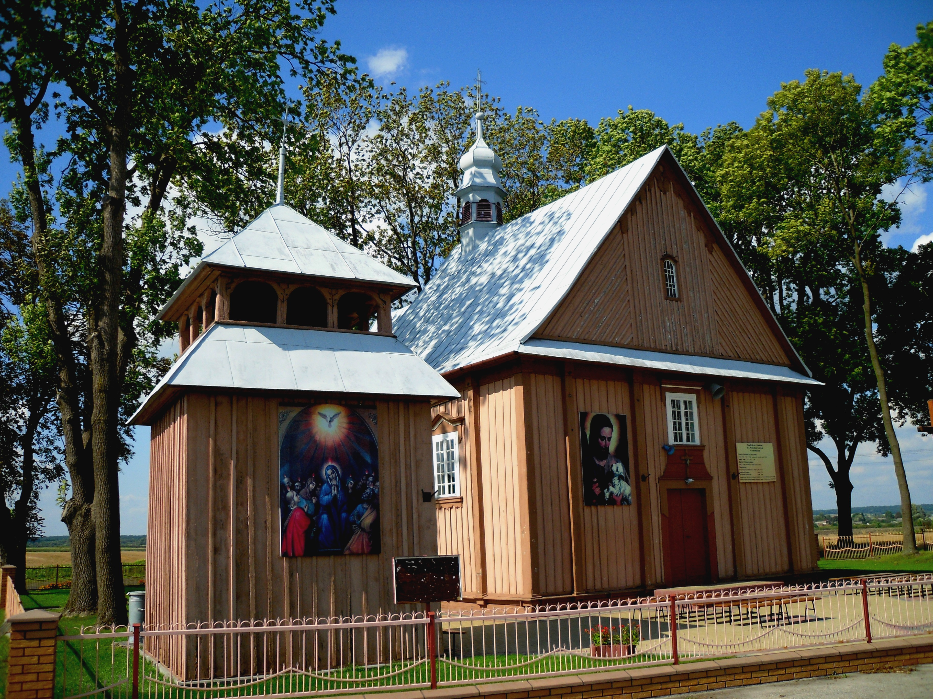 Nowe Depułtycze, kościół p.w. Wszystkich Świętych z dzwonnicą